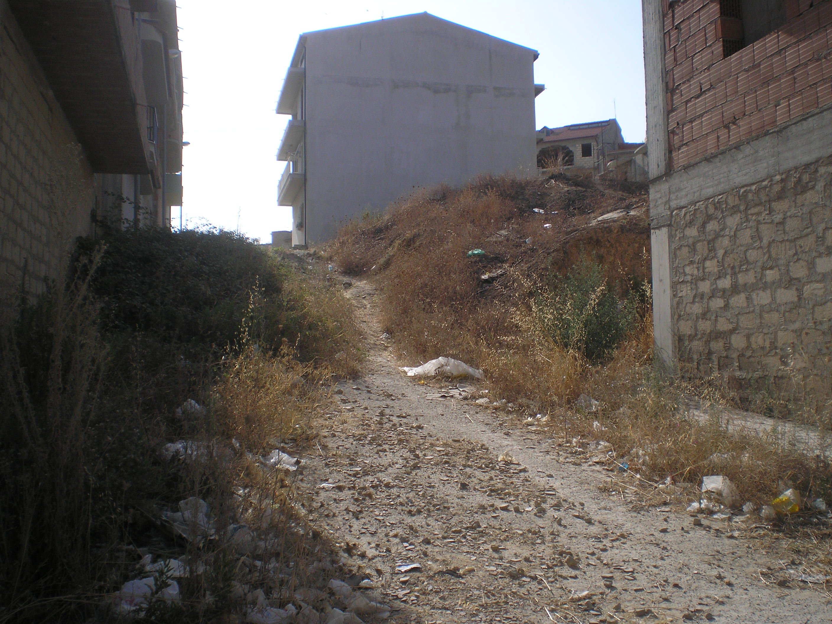 Foto di via Li Causi nel quartiere Sperlinga di Niscemi.